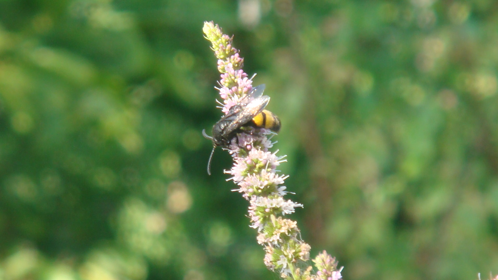 Een wesp die zich voedt met nectar.